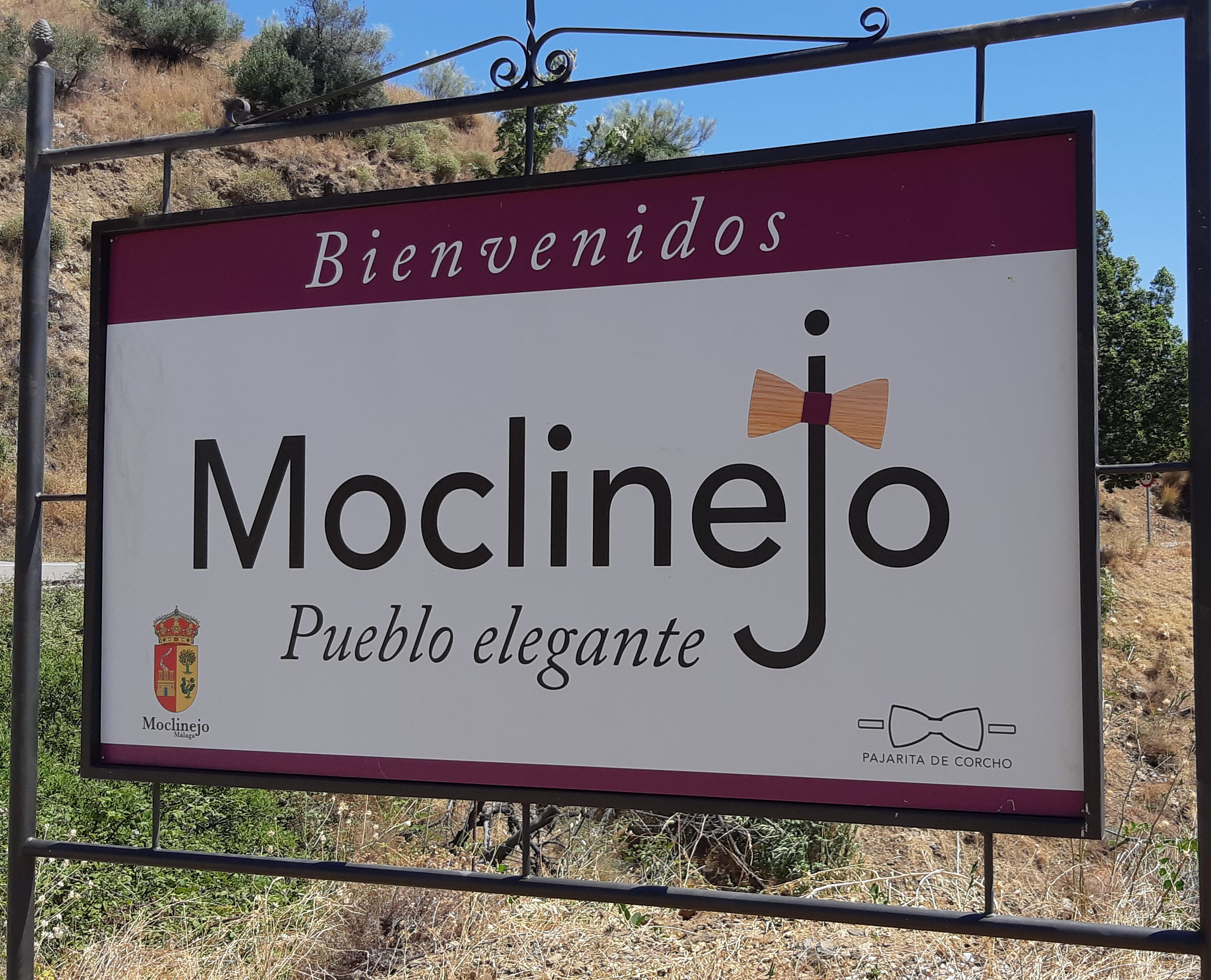 En 2020, Moclinejo es declarado Pueblo elegante